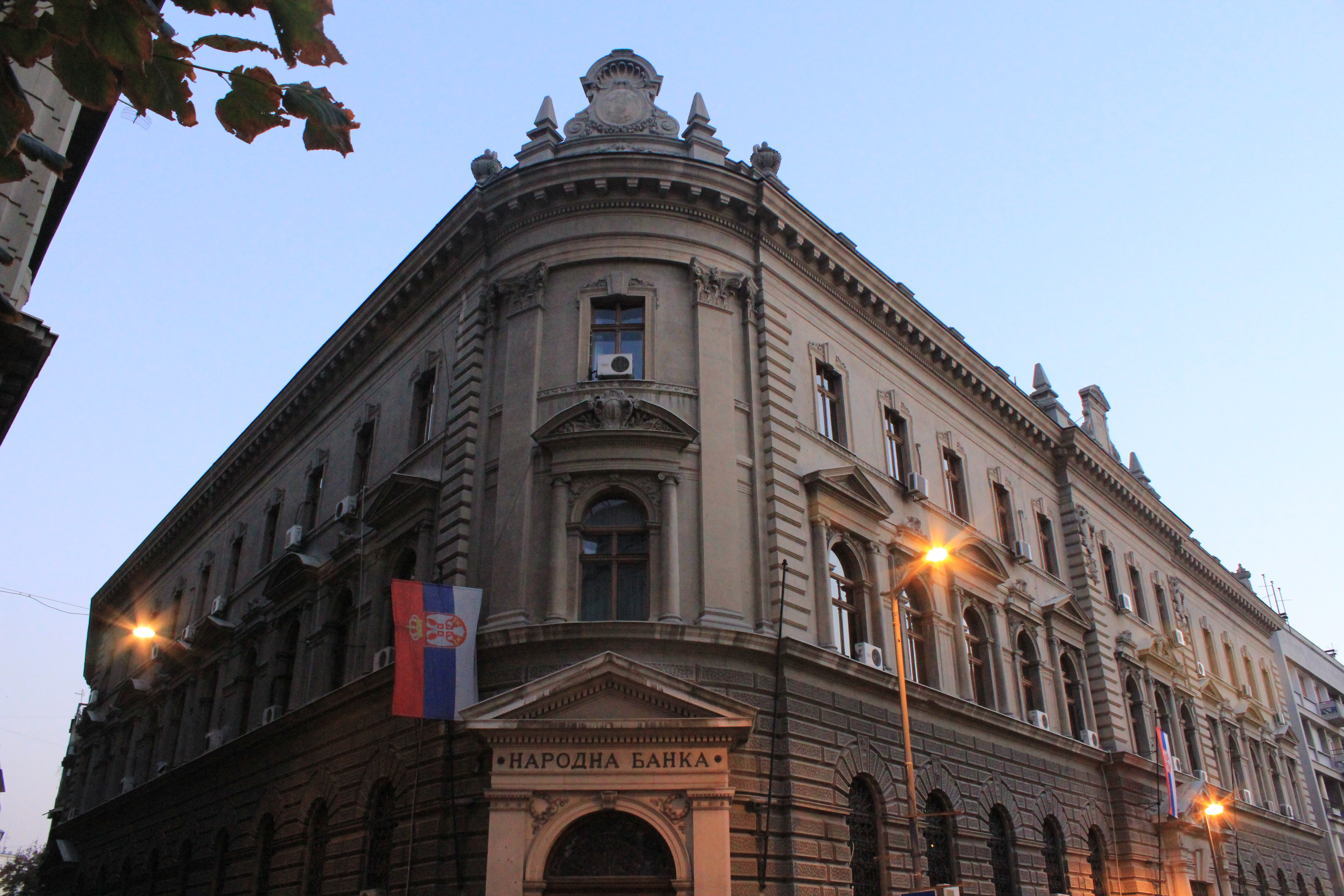 Zgrada Narodne banke Srbije u Ulici kralja Petra